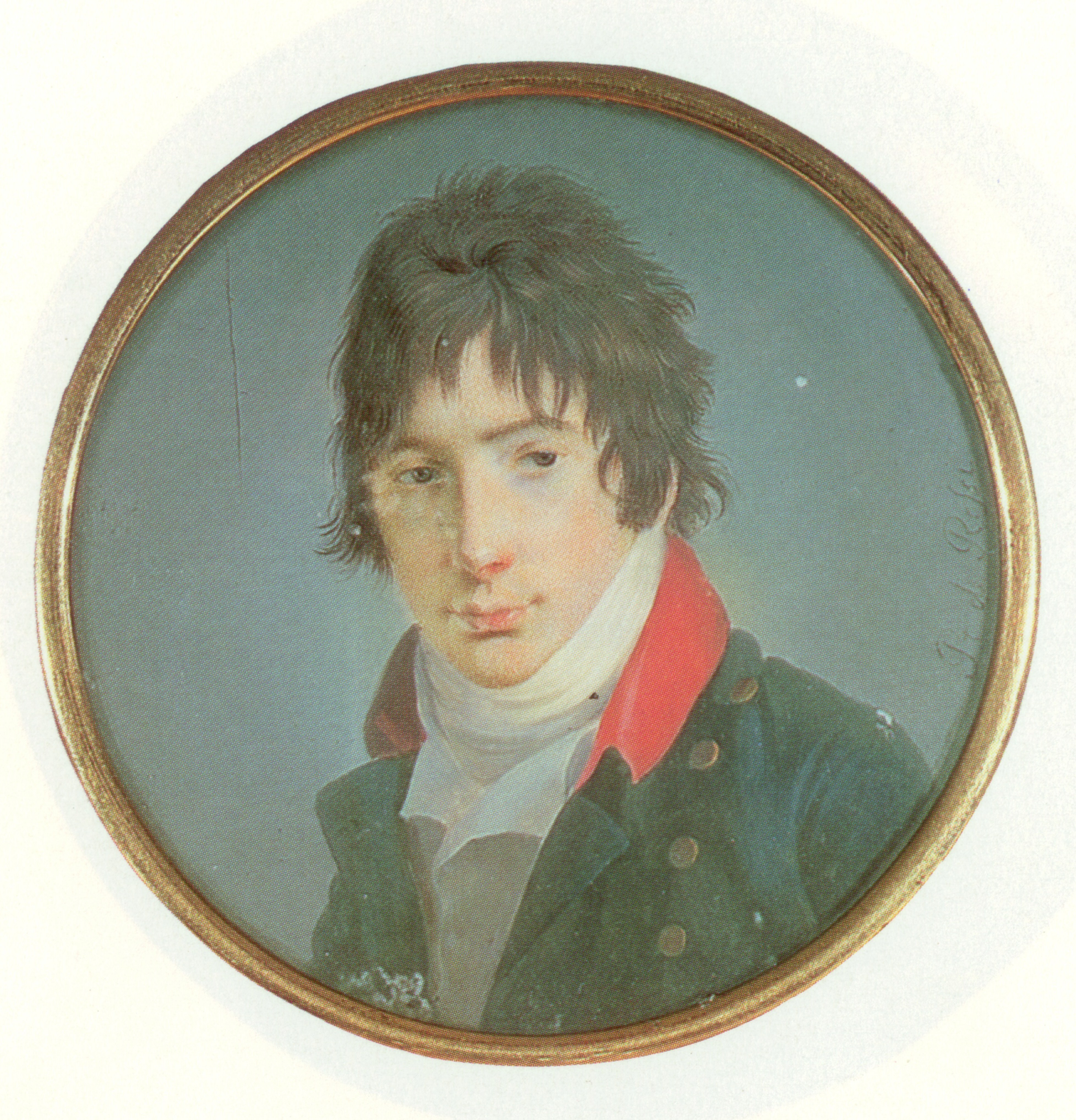 Кирилл Александрович Нарышкин (1786-1838)